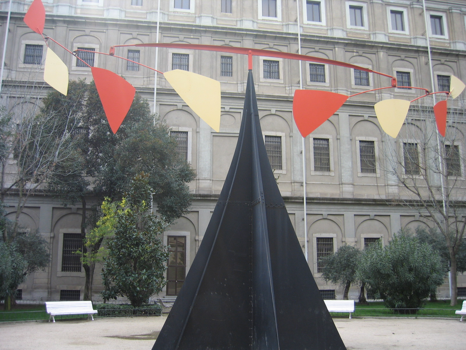 Escultura de Calder en el patio del Museo Nacional Centro de Arte Reina Sofía (MNCARS) de Madrid (España)